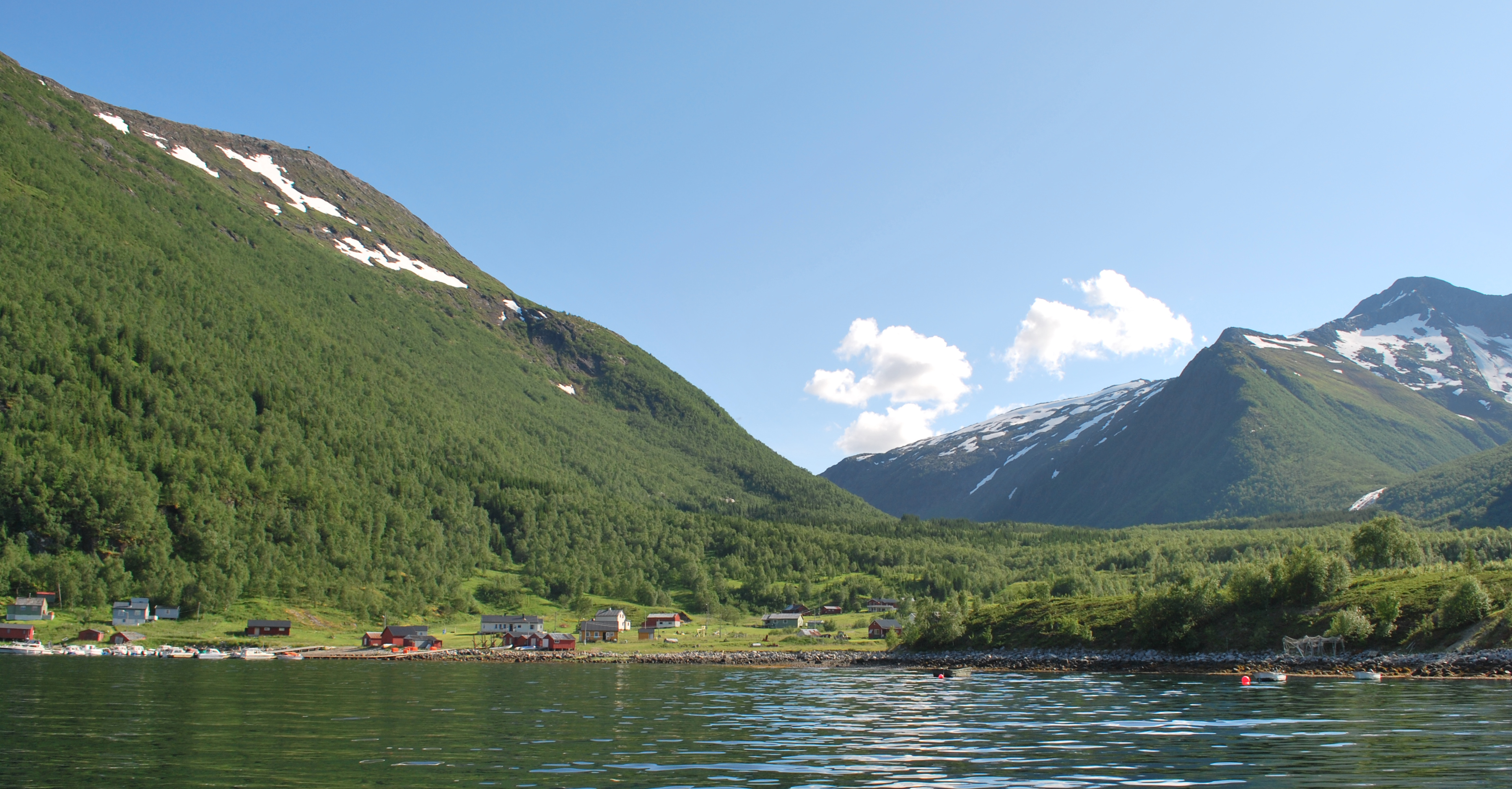 Bygda Musken (Inner-Musken) i Tysfjorden